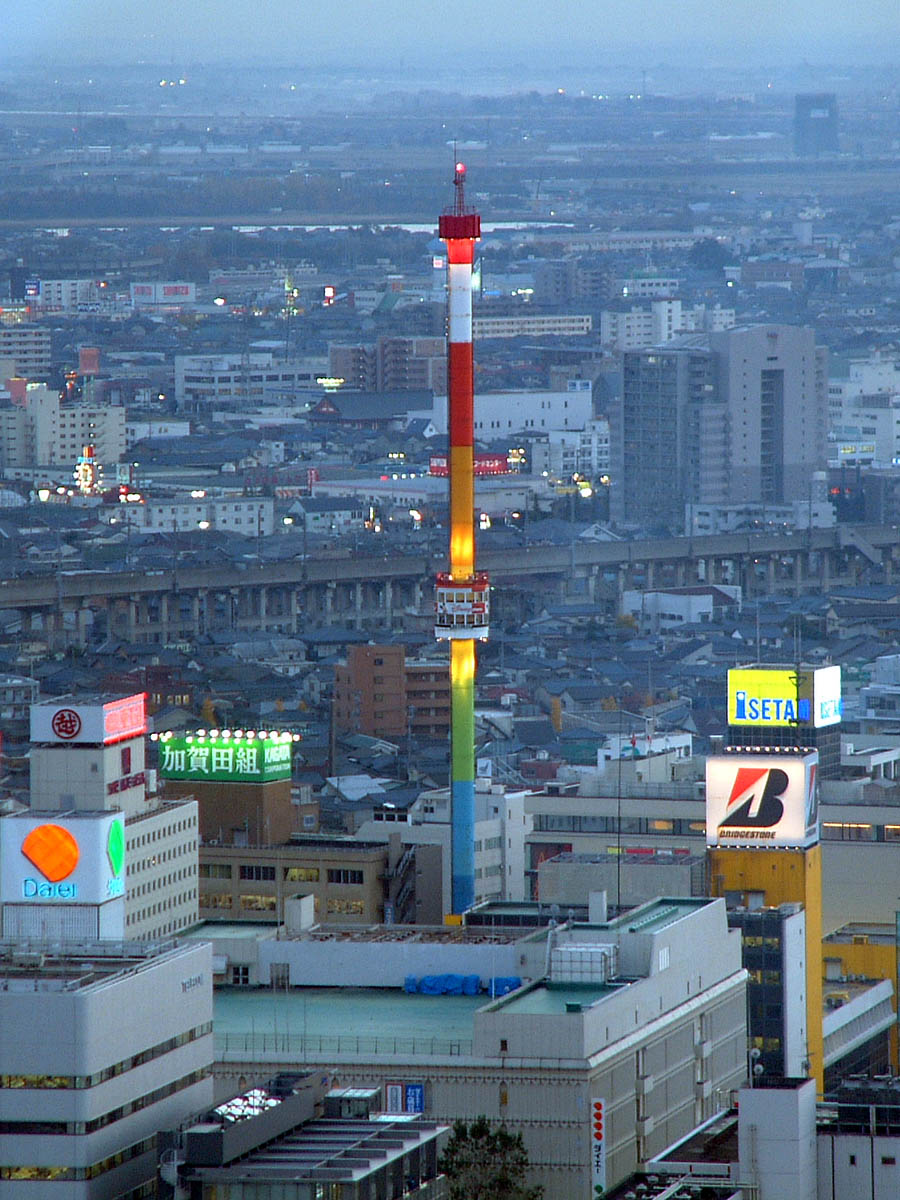 新潟市中央区の万代シティバスセンターに建つレインボータワー。朱鷺メッセ展望室より望む。